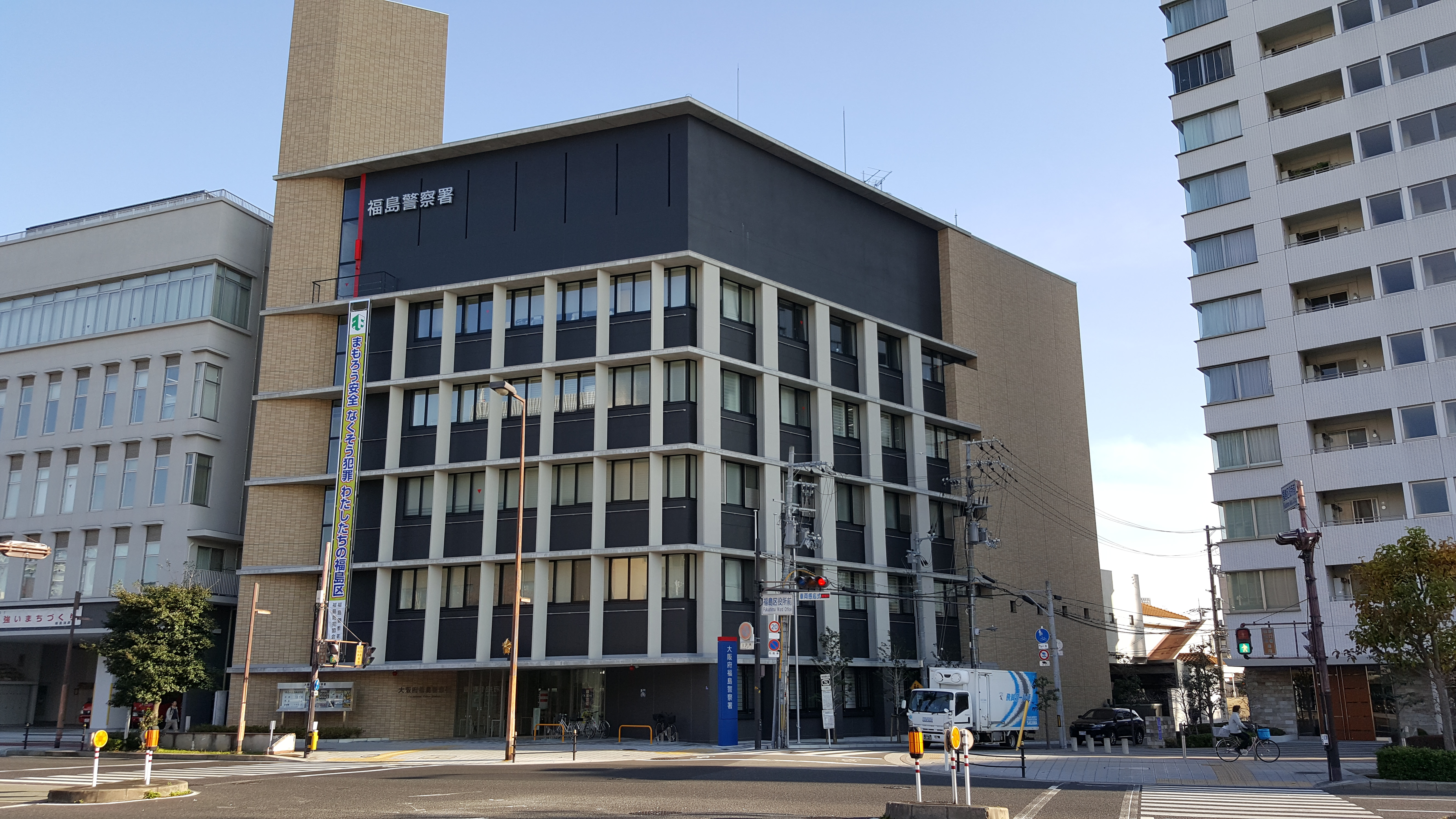 大阪府福島警察署（２０１６年新庁舎）